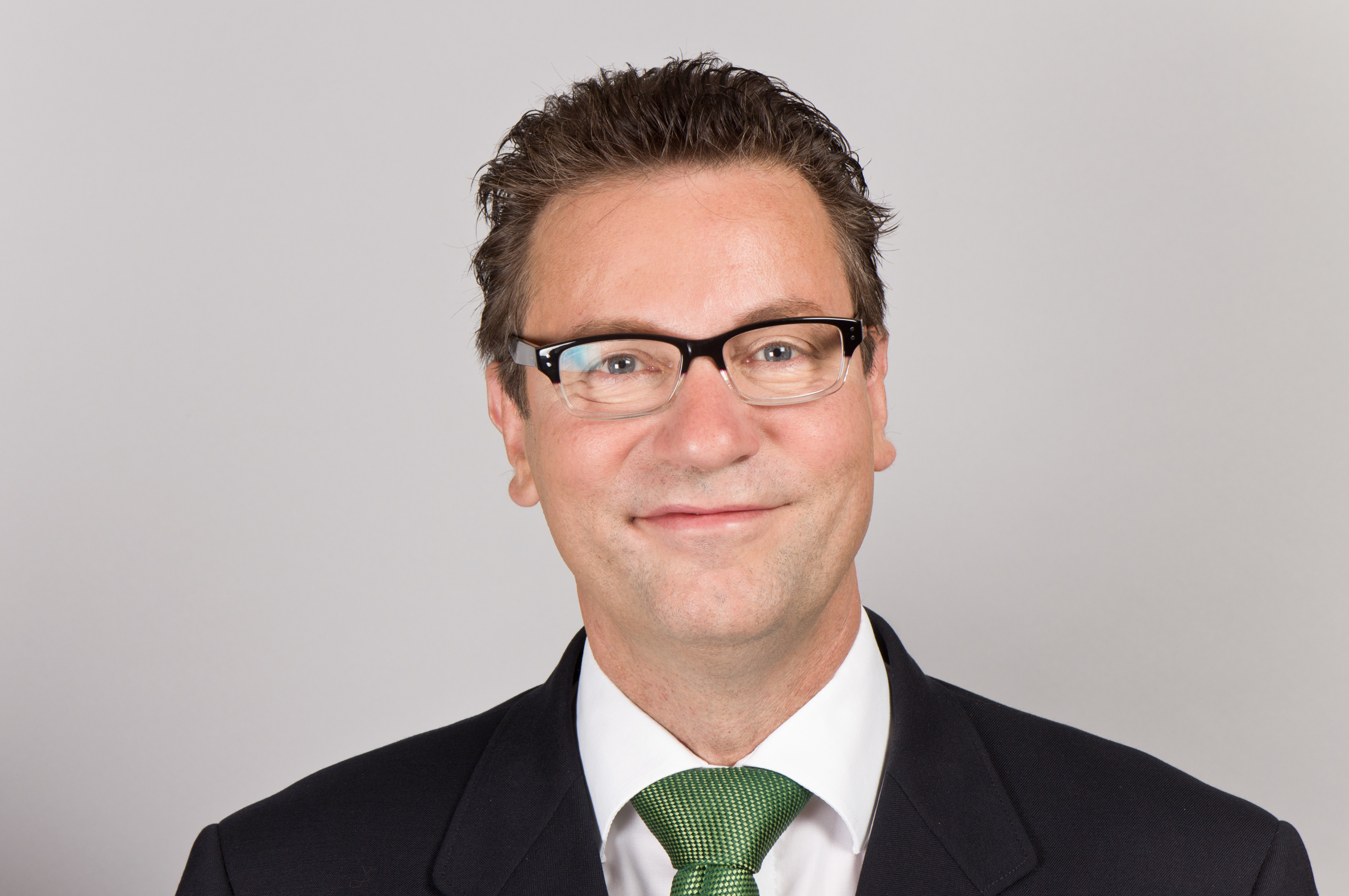 Peter Hauk. Wikipedia im Landtag – Baden-Württemberg 15.–16. Mai 2013 in Stuttgart Fragen zur Nachnutzung Wenn Sie Fragen zur Nachnutzung dieses Bildes haben, können Sie sich jederzeit gern an wenden Personality rights warningAlthough this work is freely licensed or in the public domain, the person(s) shown may have rights that legally restrict certain re-uses unless those depicted consent to such uses. In these cases, a model release or other evidence of consent could protect you from infringement claims.